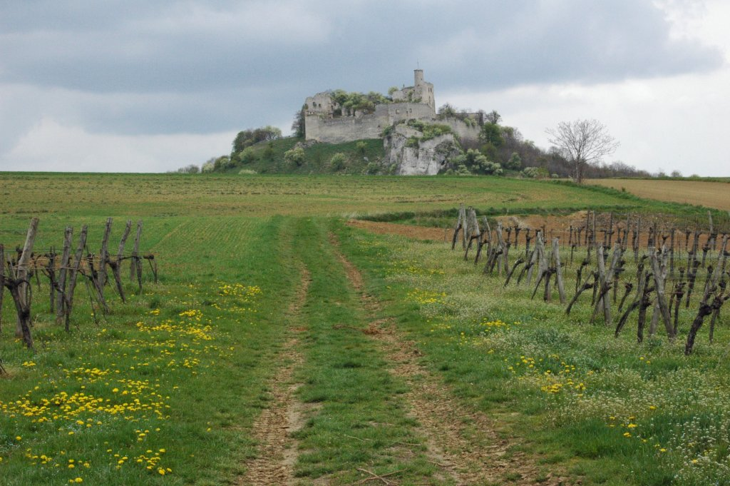 Catle Falkenstein, Lower Austria